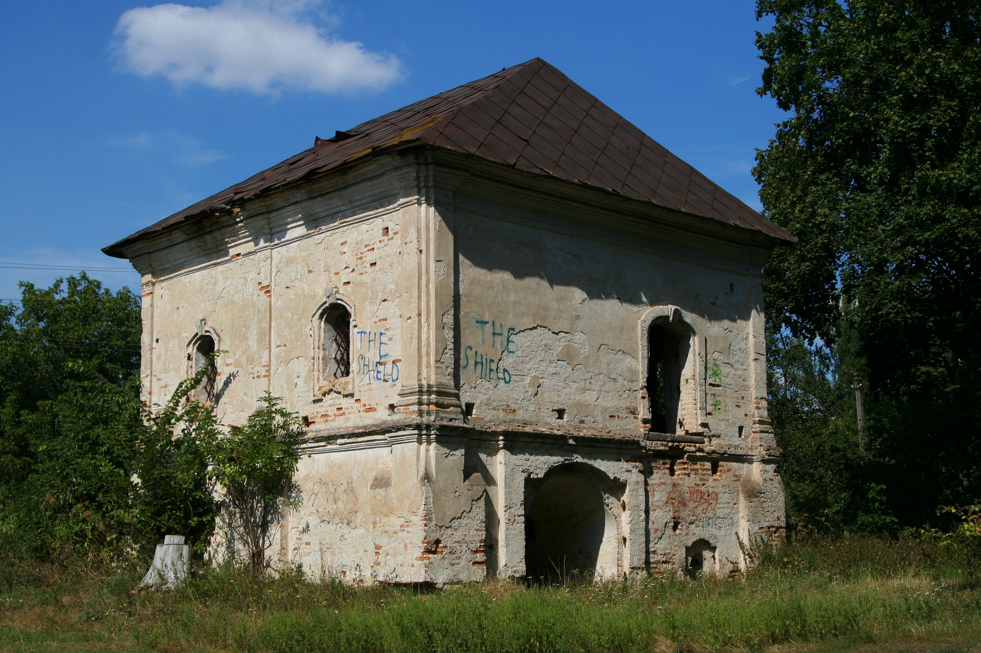 Кам'яниця (мур.) – пам’ятник, пов’язаний з історією родини Розумовських, Козелець, вул. Розумовських, 41